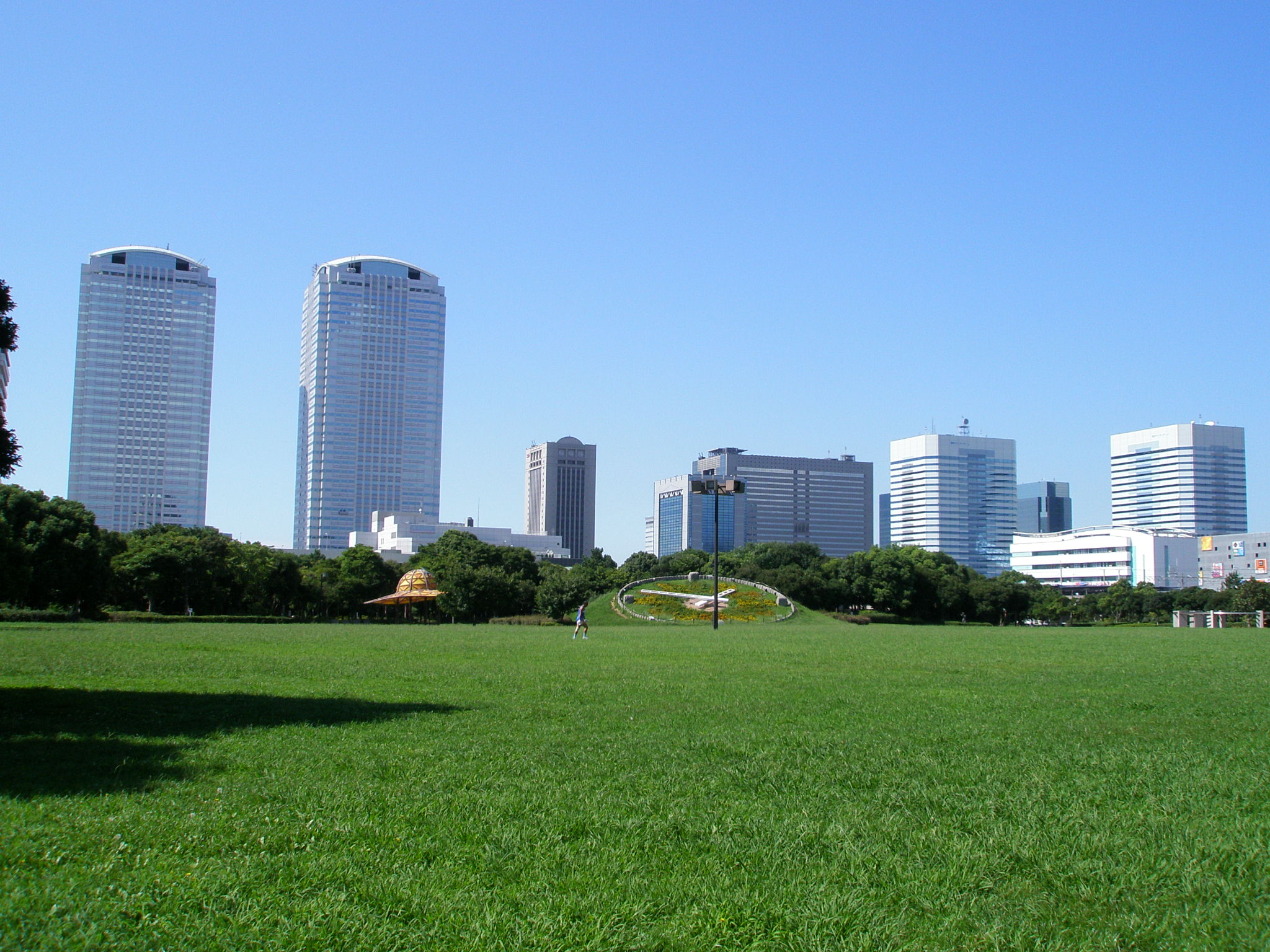 幕張海浜公園から望む幕張新都心のビル群